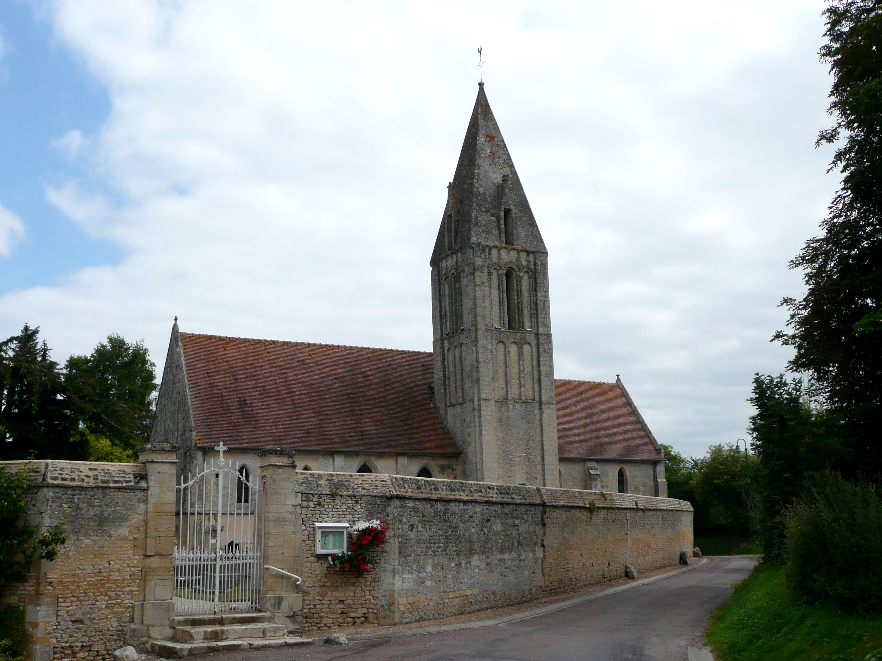 Eglise de Rosel